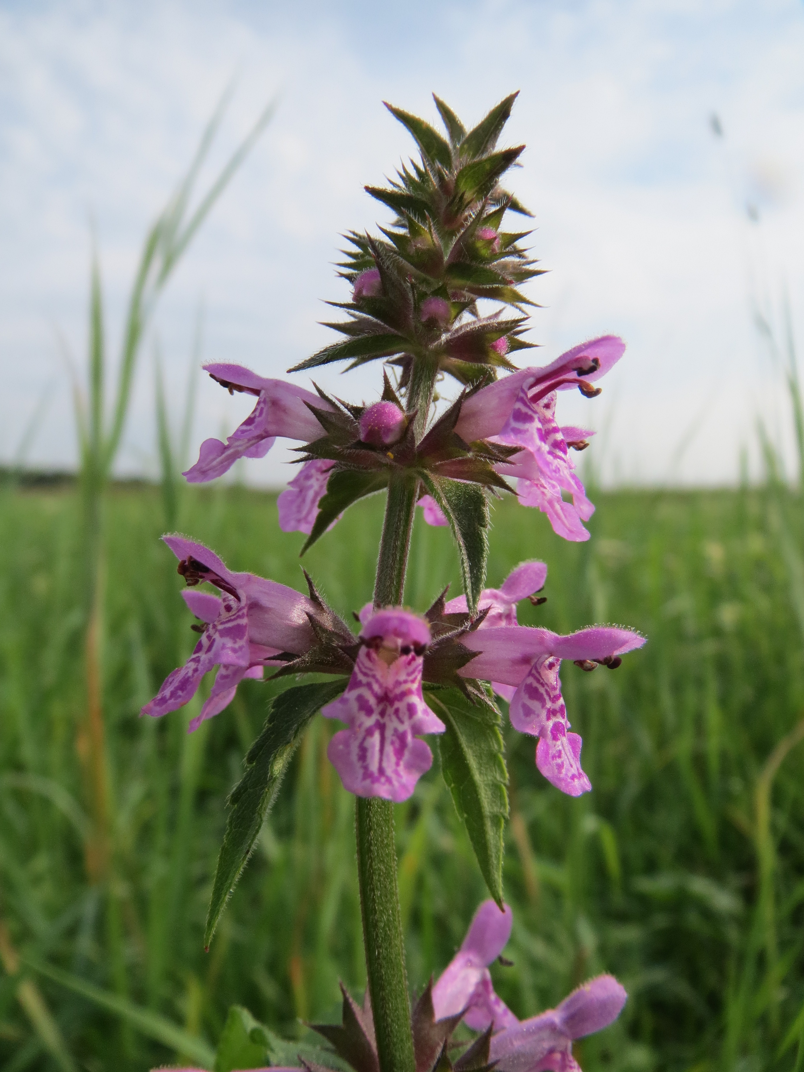 Sumpf-Ziest (Stachys palustris) im Hockenheimer Rheinbogen